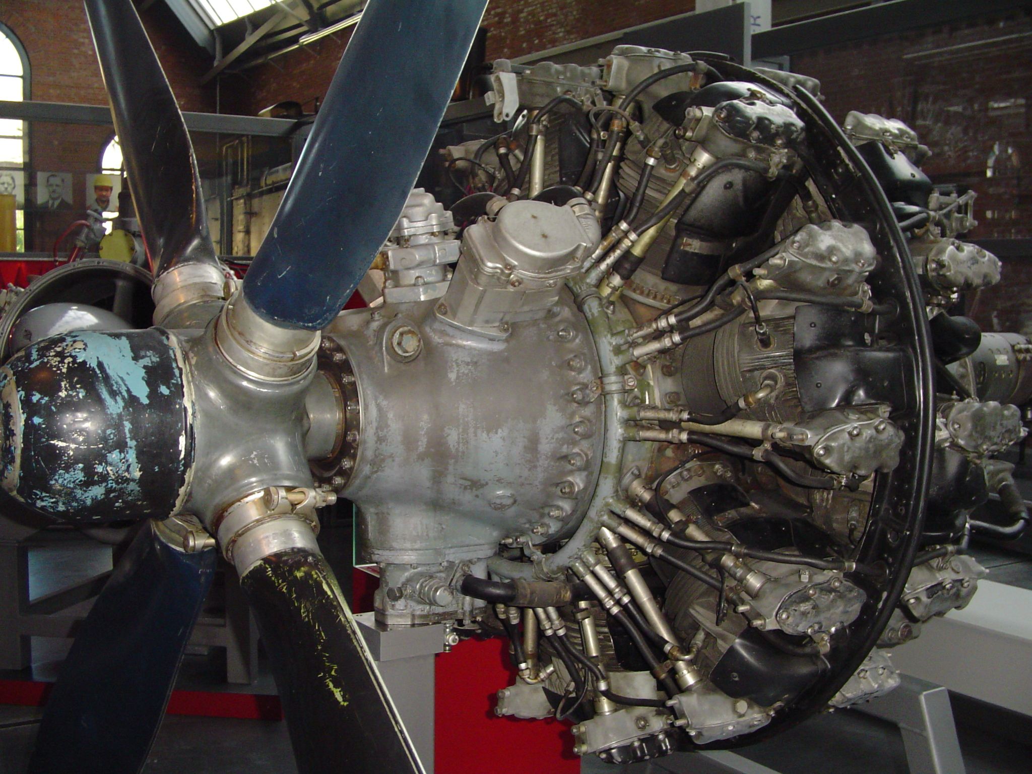 ASch-82T von 1957.Hersteller: VEB Industriewerke Karl-Marx-Stadt, 1.900 PS Startleistung, Gewicht: 1.020 kg, mit hydraulisch verstellbarer Luftschraube.Aufgenommen im sächsischen Industriemuseum Chemnitz.